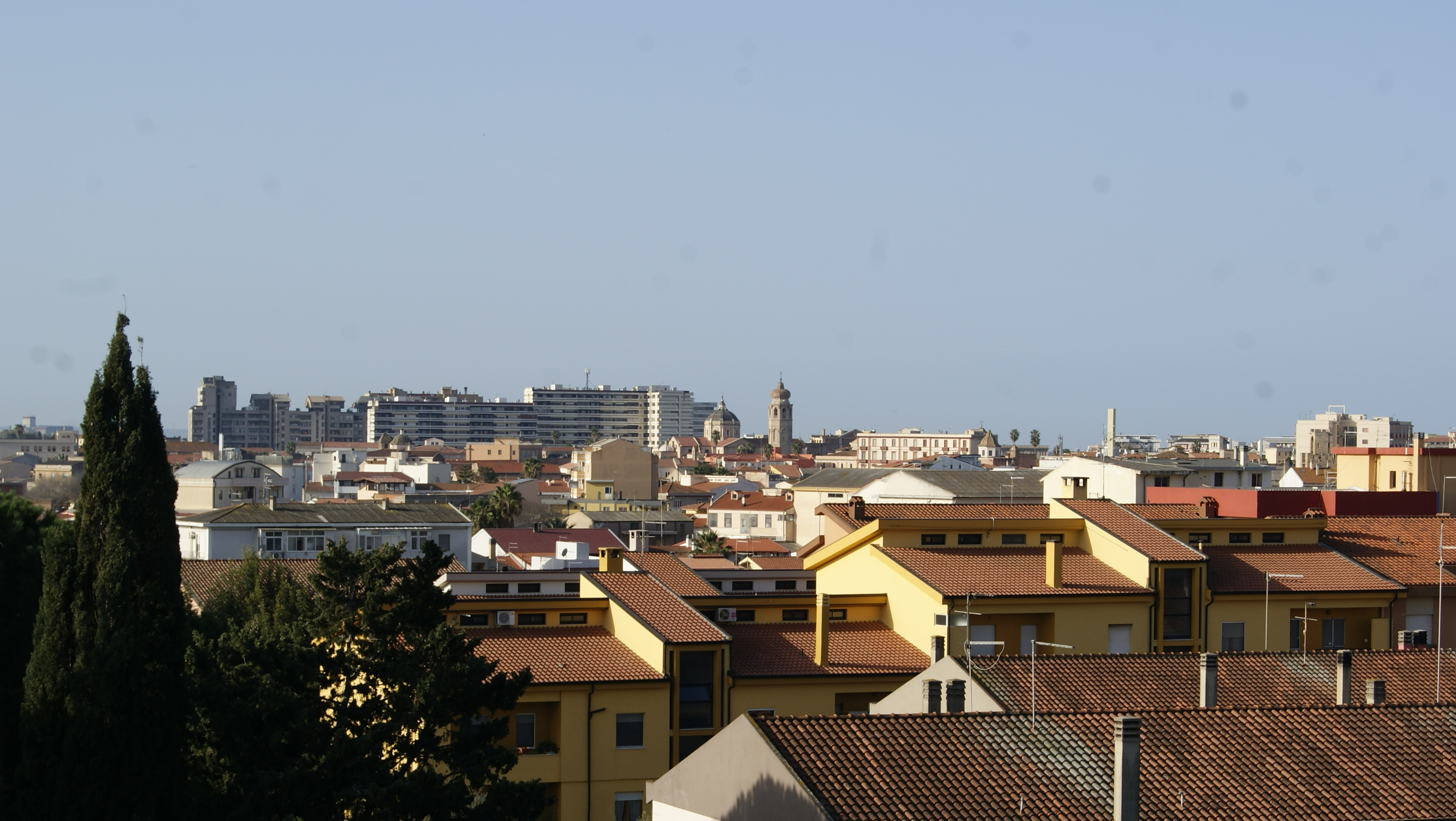 Panorama di Oristano (Vista da Torangius)